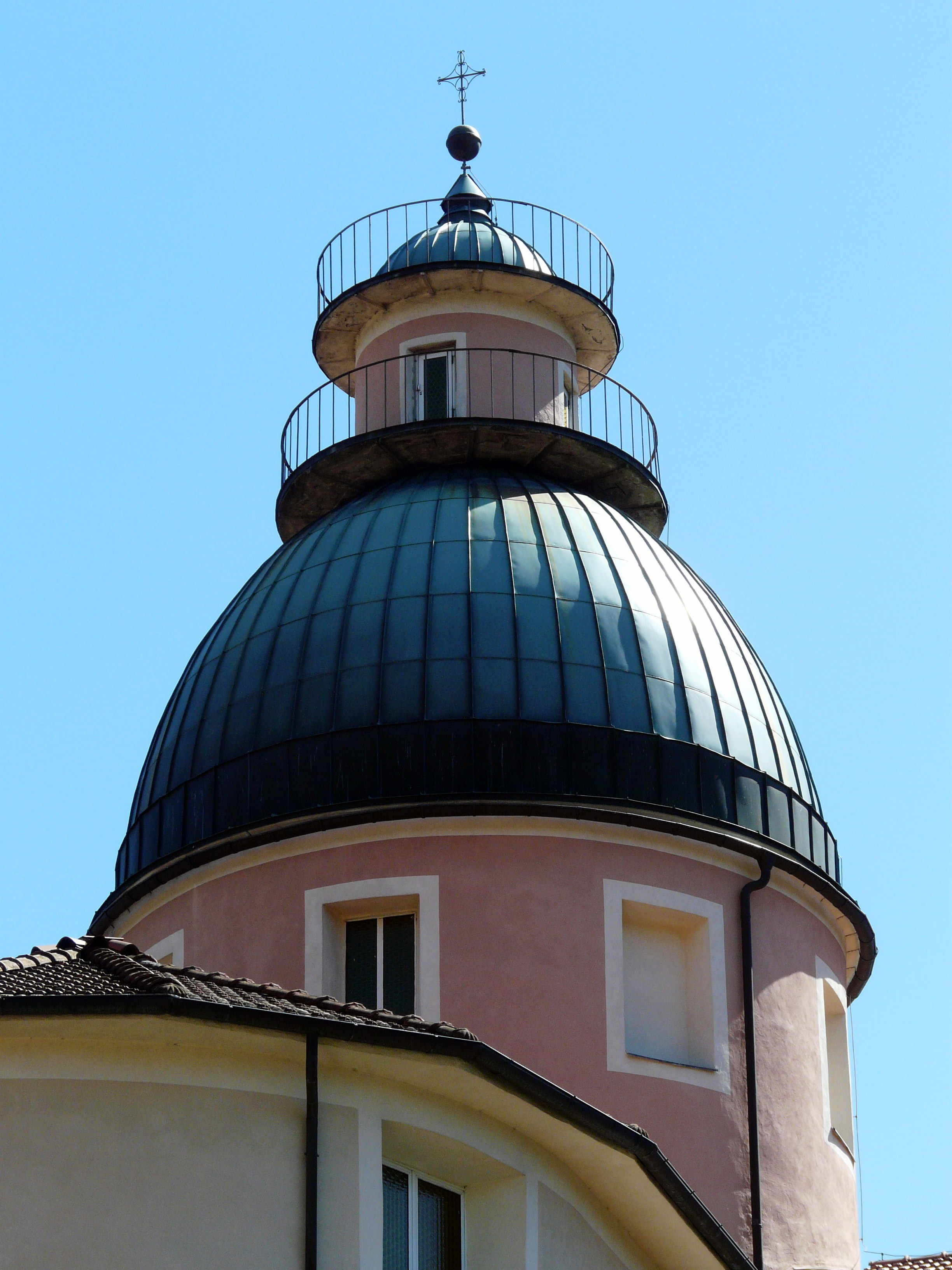 Cupola esterna della chiesa di Santa Maria Ausiliatrice di Piana Battolla, Follo, Liguria, Italia